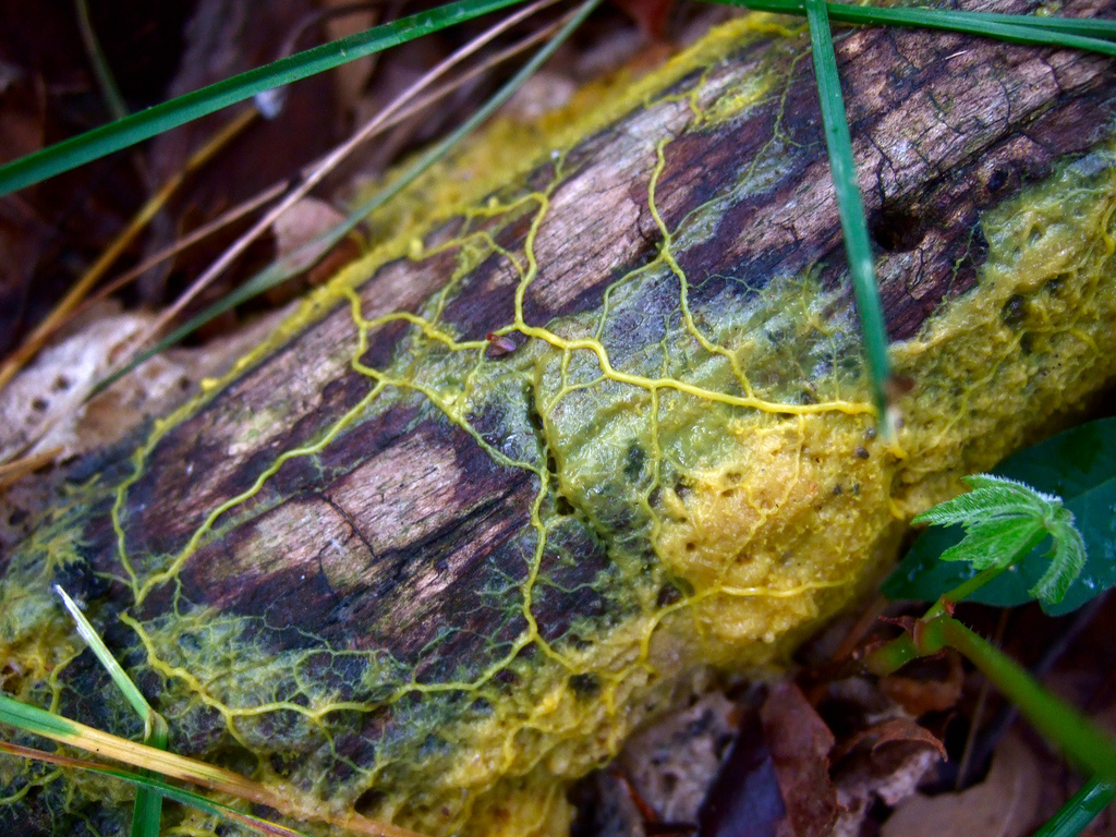 плазмодій слизовика виду Physarum polycephalum